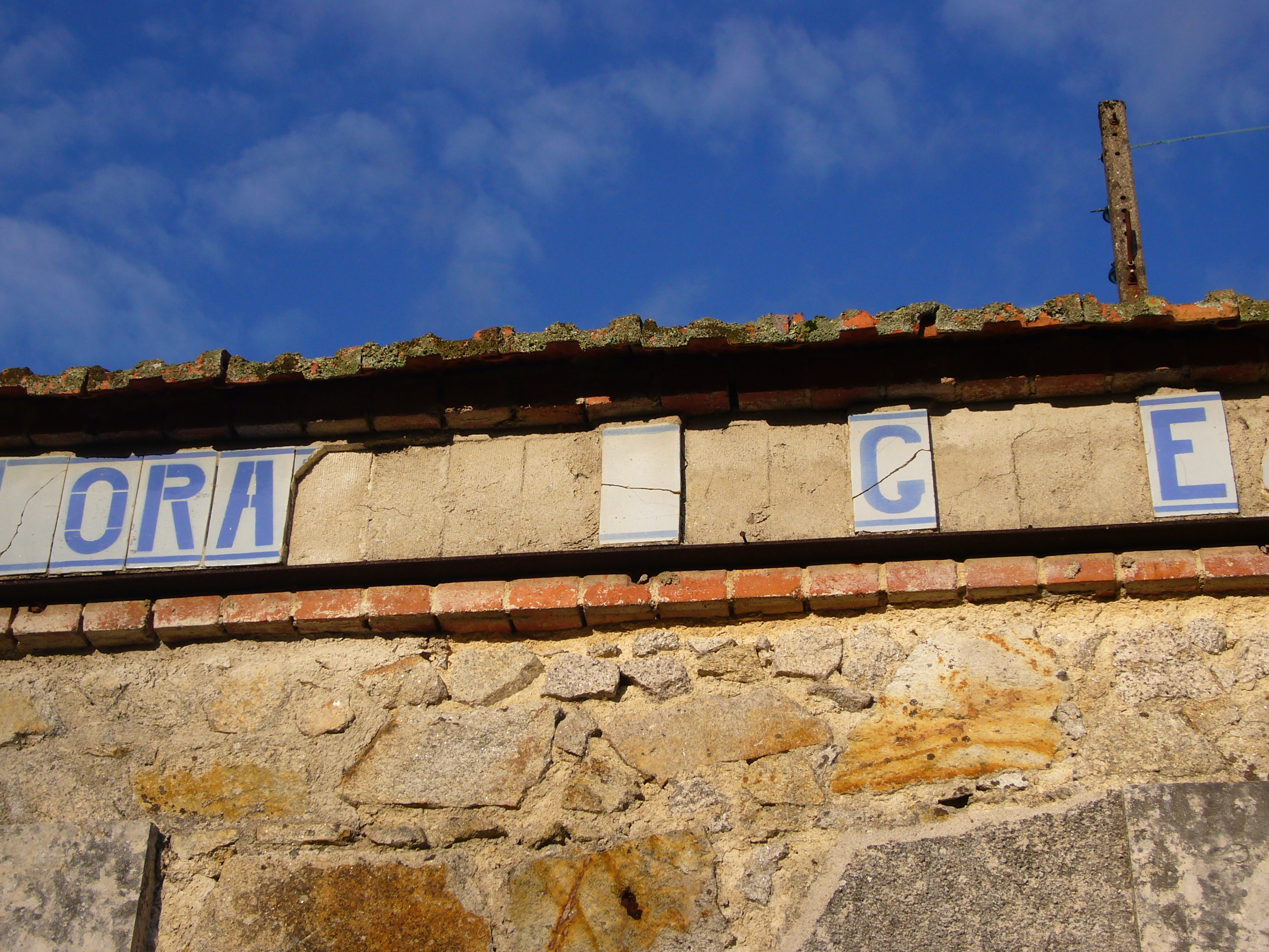 Arrêt du tramway dans la village martyr d'Oradour-sur-Glane (87, France). Notons que les aléas du massacre, du temps et du climat n'ont laissé que quelques carreaux, formant le mot ORAGE.